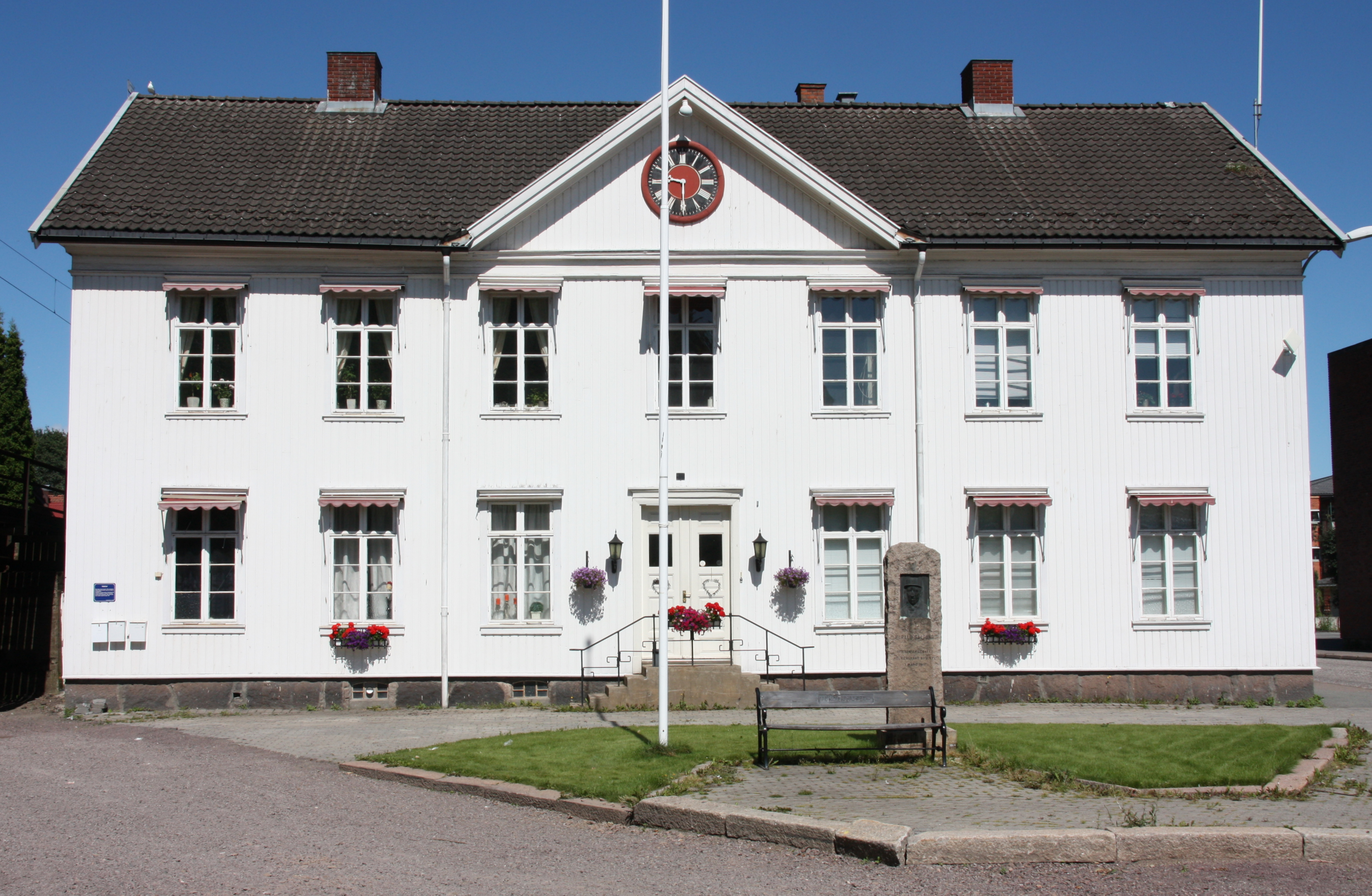 Gamle Holmestrand Politistasjon